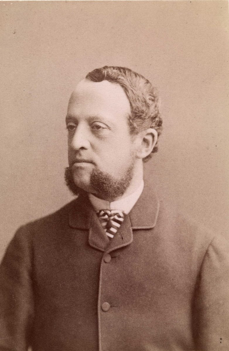 Nils August Andresen Butenschøn (1842-1935), Norwegian businessperson.